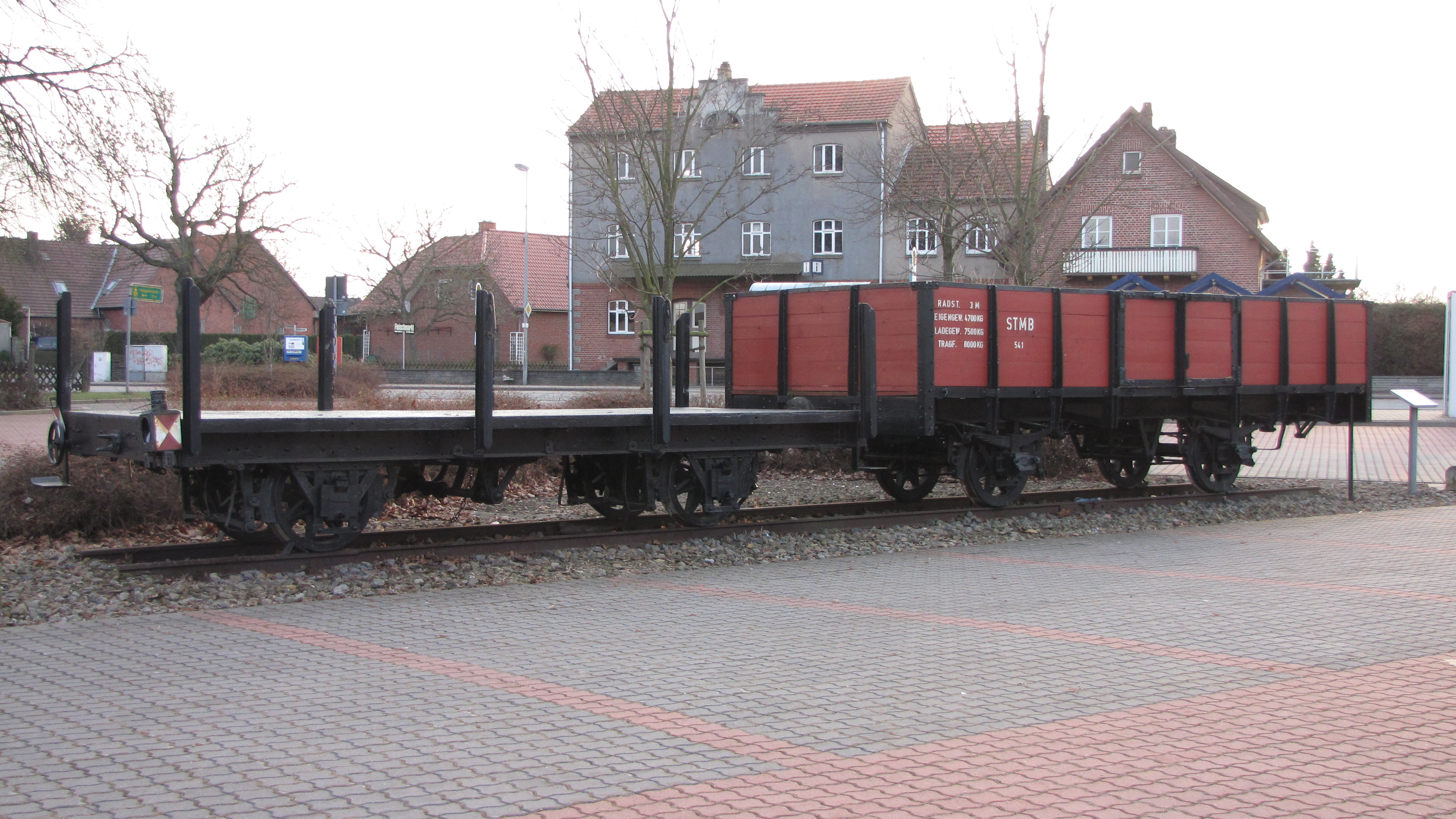 Zwei Fahrzeuge der Steinhuder Meer-Bahn in Leese als Denkmal aufgestellt